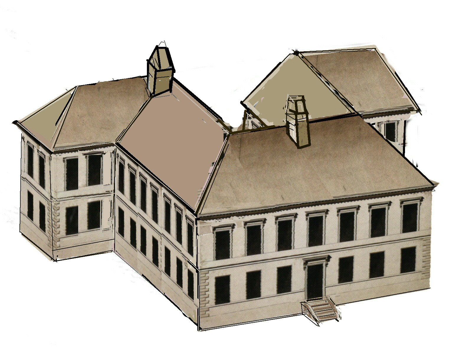 Rekonstruktion des ehemaligen Palais Asbeck in München